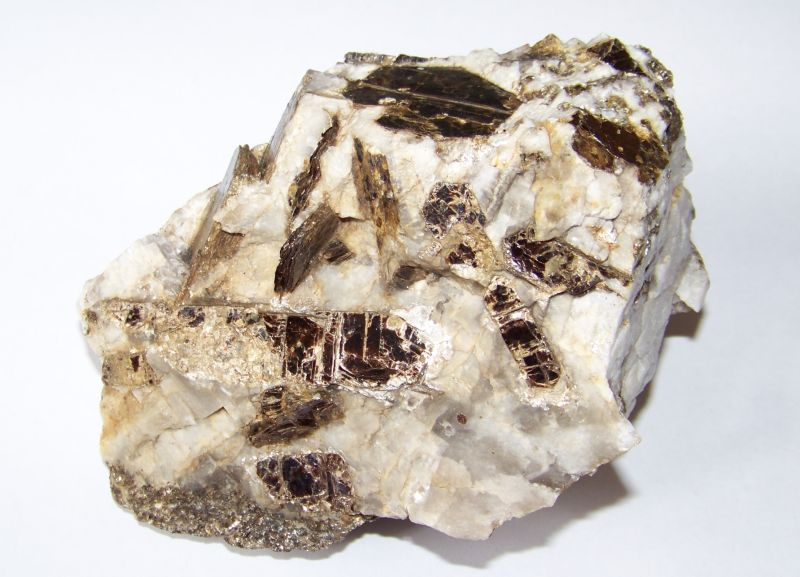 Pegmatyt anatektyczny z biotytem. Michałkowa, Góry Sowie, Dolny Śląsk, Polska.